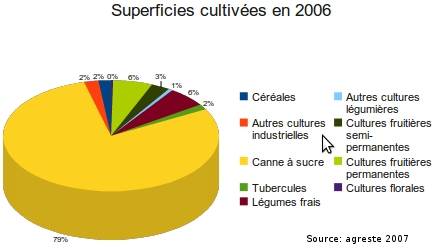 Surfaces cultivées sur l'île de La Réunion, en %. Total SAU: 43 692 ha